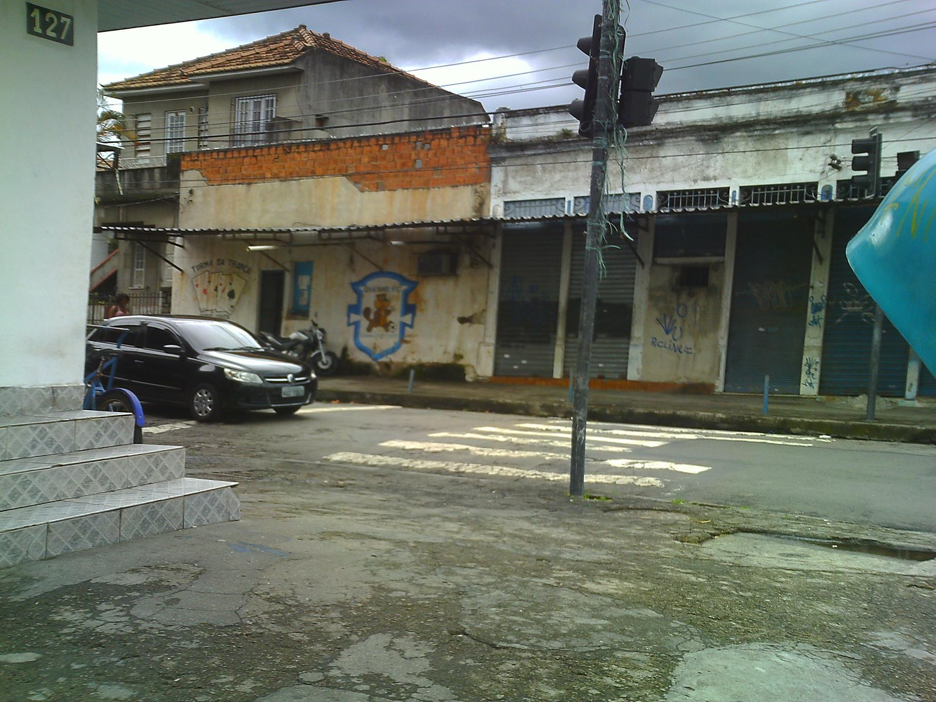 Rua Cruz e Souza, esquina com Clarimundo de Mello, no Encantado, Rio de Janeiro - RJ.